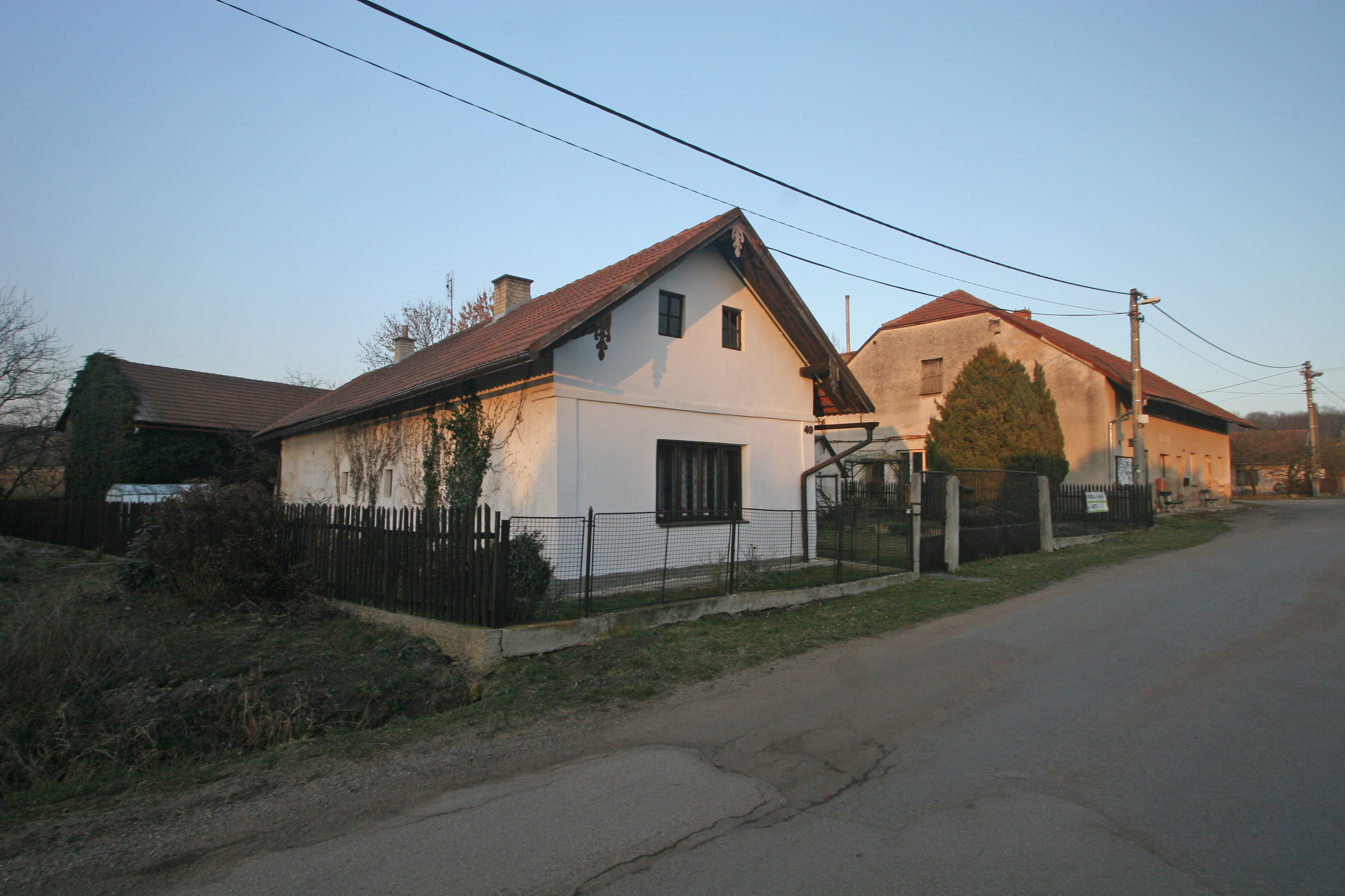 Stříbrnice čp. 49